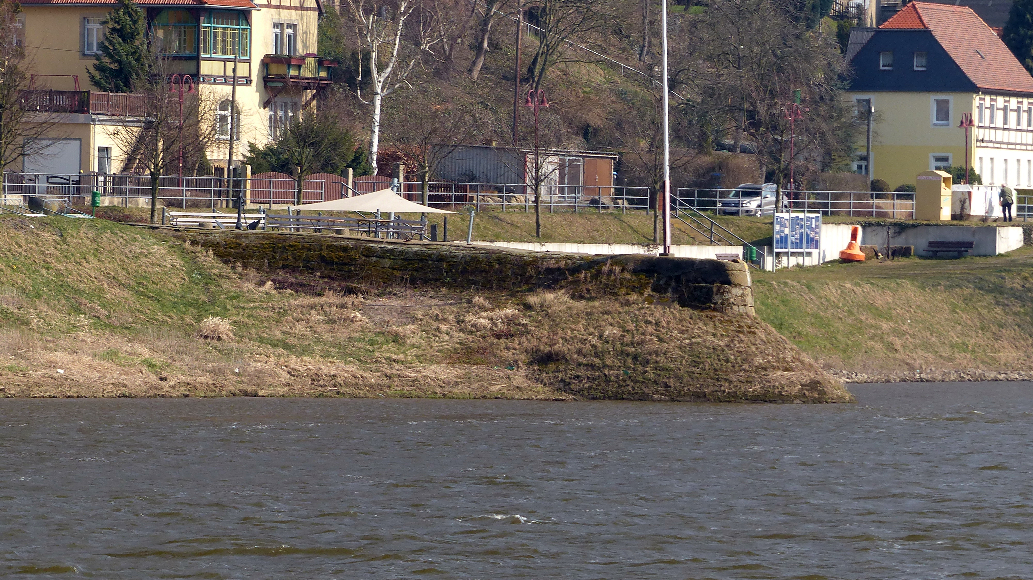 "Habe", Uferbestigungsanlage zum Schutz vor Eisgang, in Postelwitz, Bad Schandau